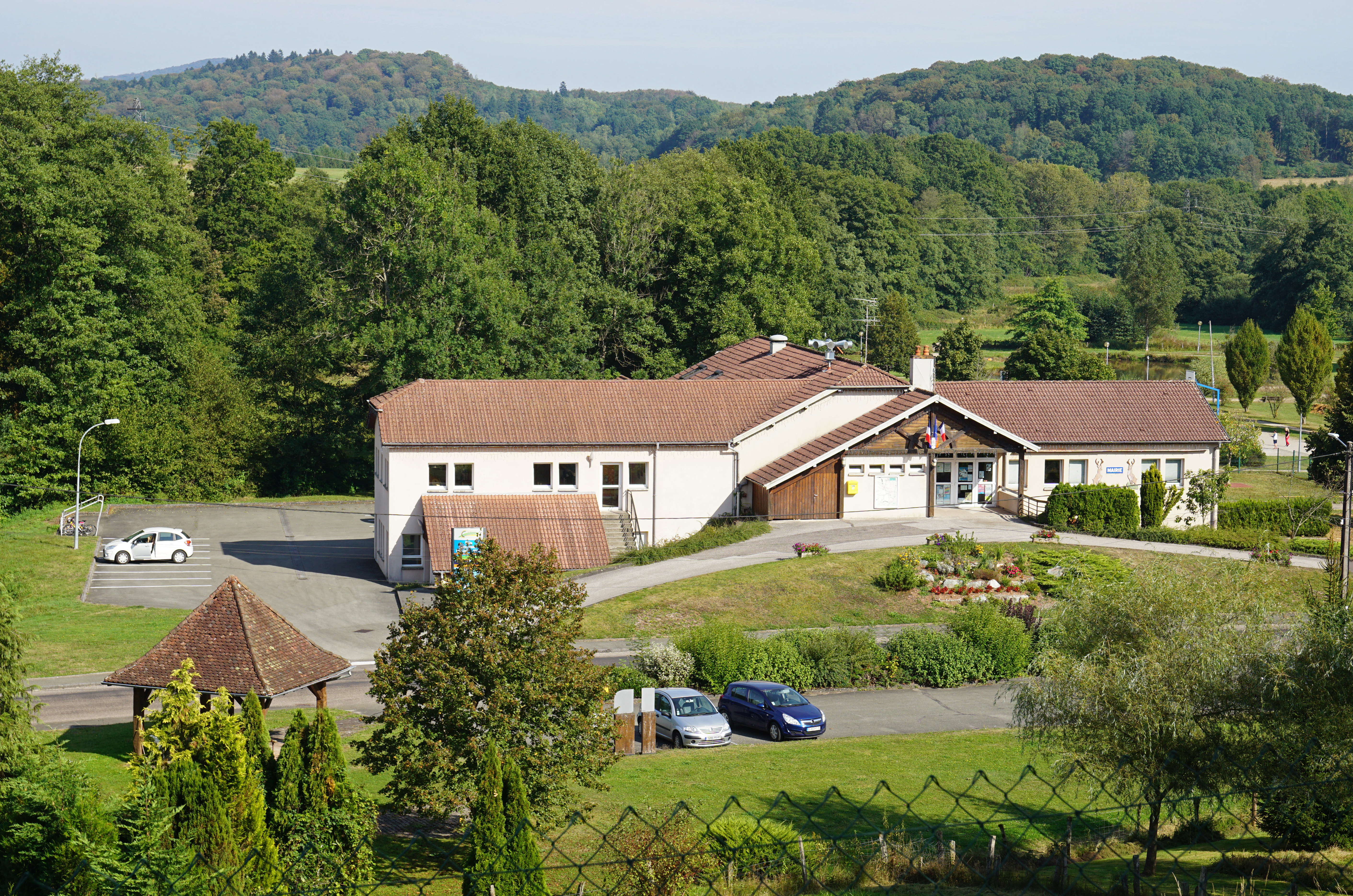 Mairie de Chenebier.